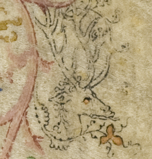 Hs. 400, f. 1r. Detail van de marges: een hert.